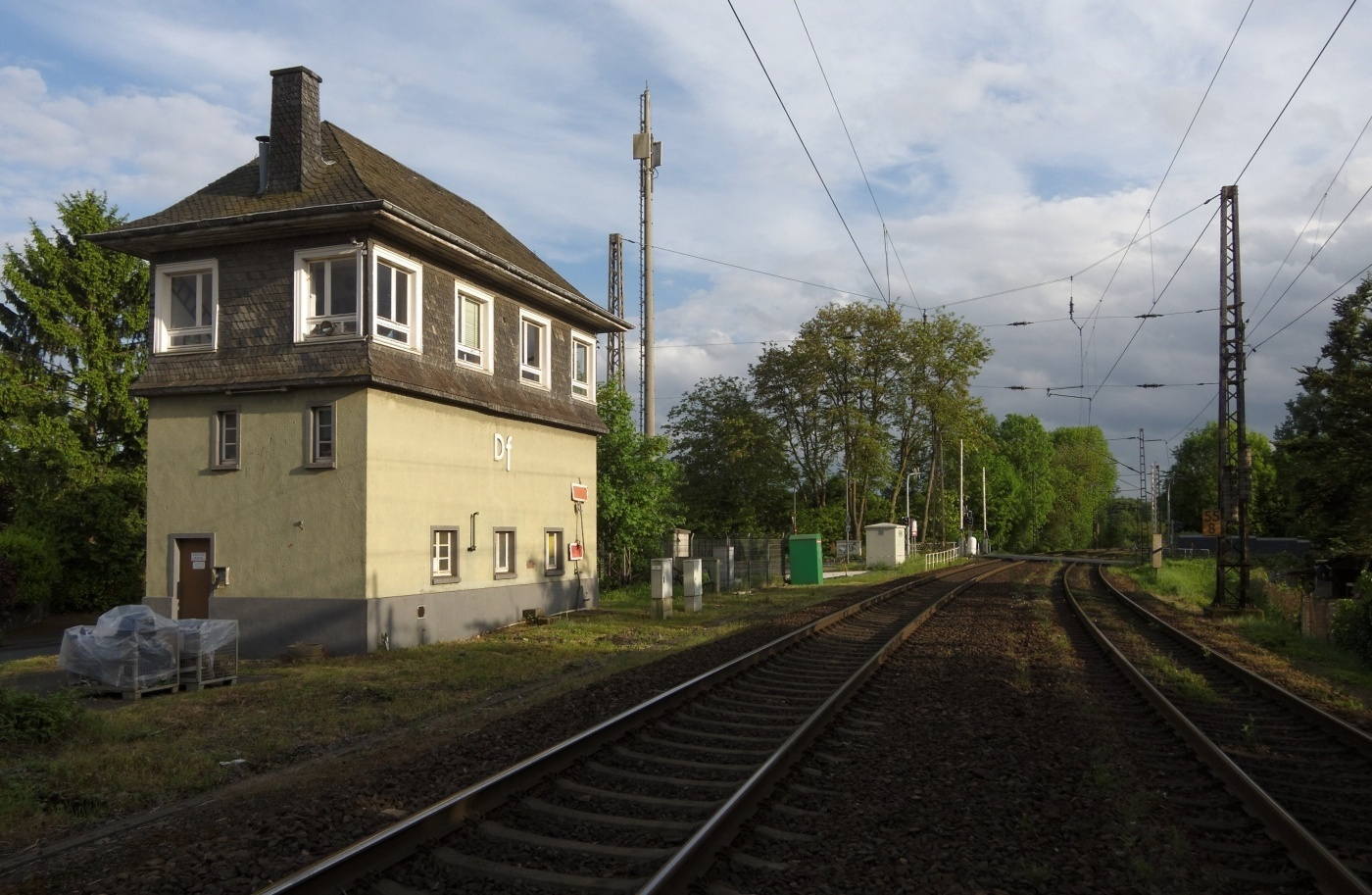 Das Stellwerk Köln-Dünnwald Df (heute Museum) von Außen.